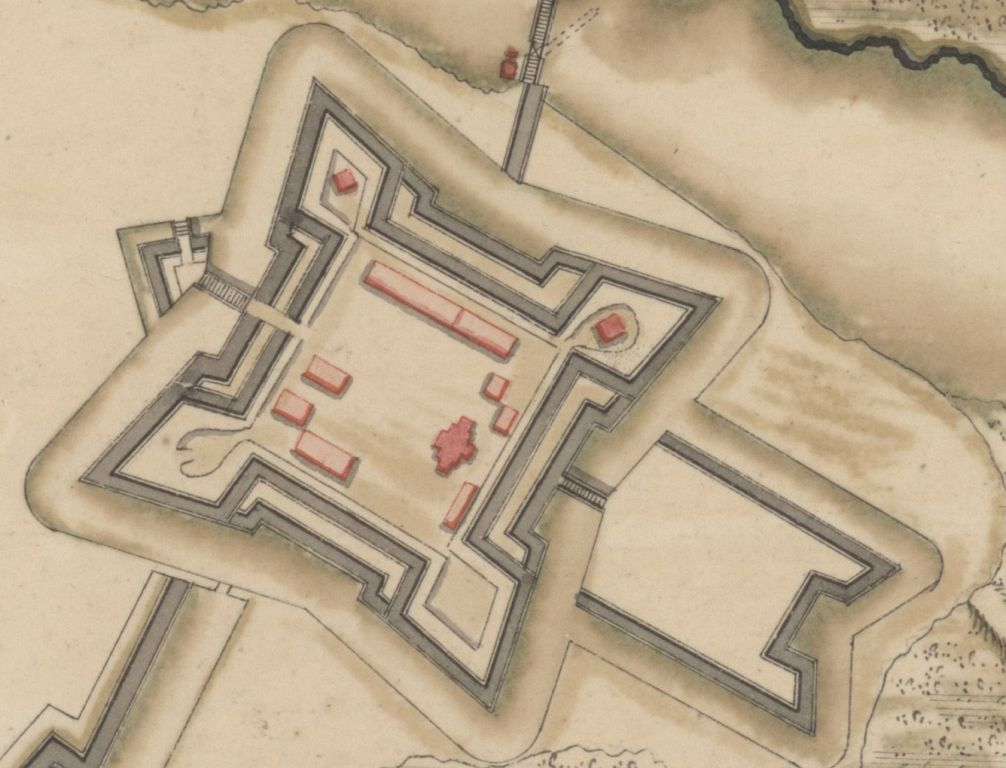 Новы замак, або бастыённы замак у Слуцку , |New_Castle_in_Sluck, Belarus , |Neuer Burg in Sluck, Belarus